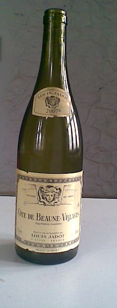 വൈൻ കുപ്പി